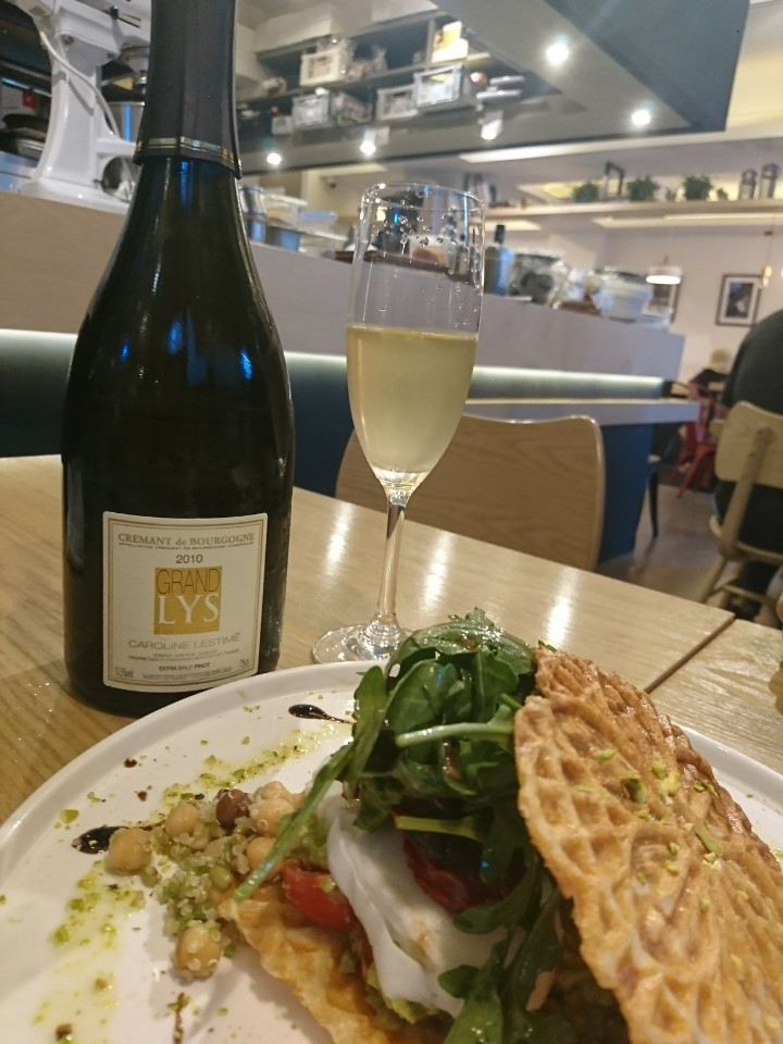 샴페인잔